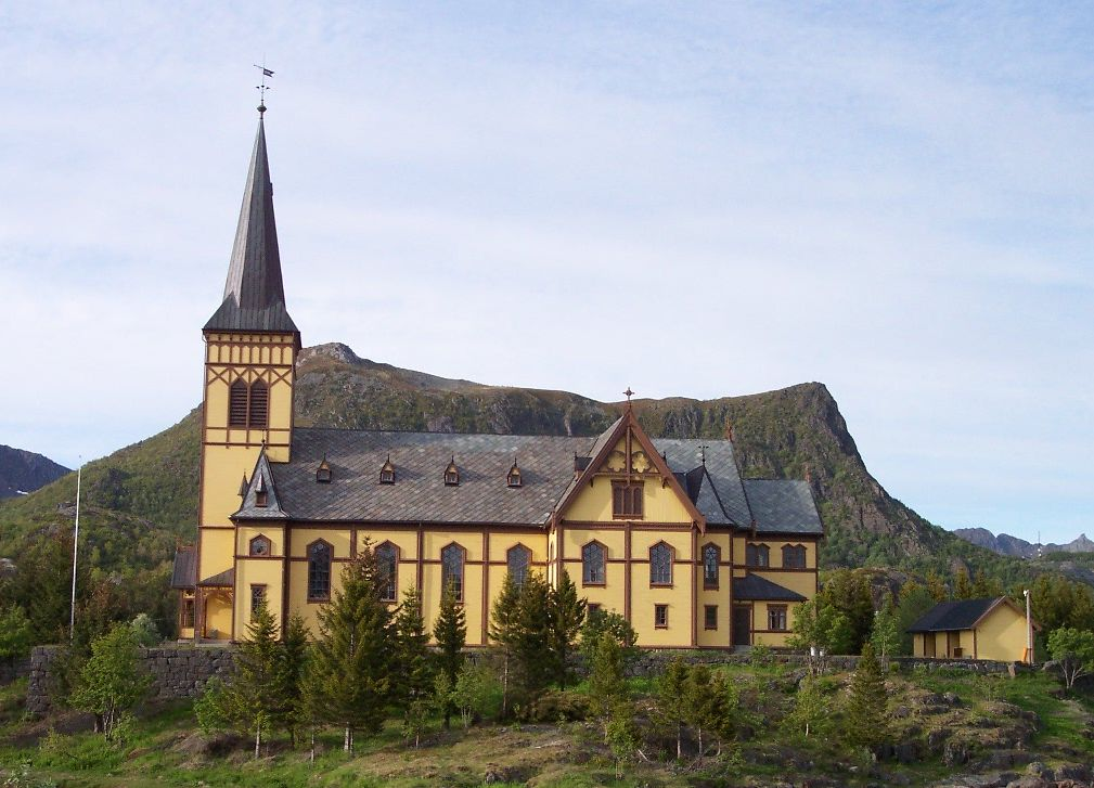 Vågan kirke i Lofoten i Nordland.